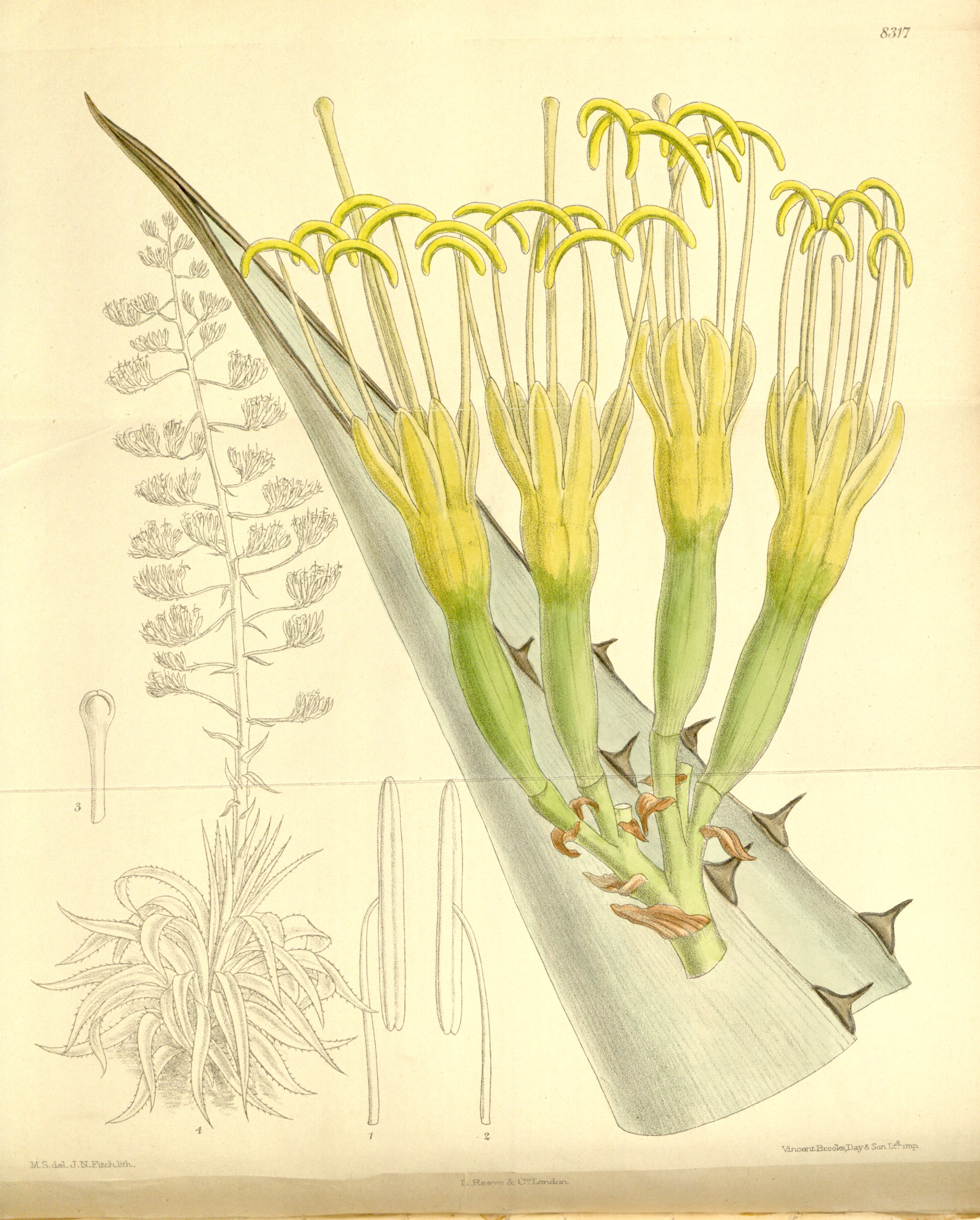 Agave franzosinii (= Agave beauleriana), Asparagaceae, Agavoideae